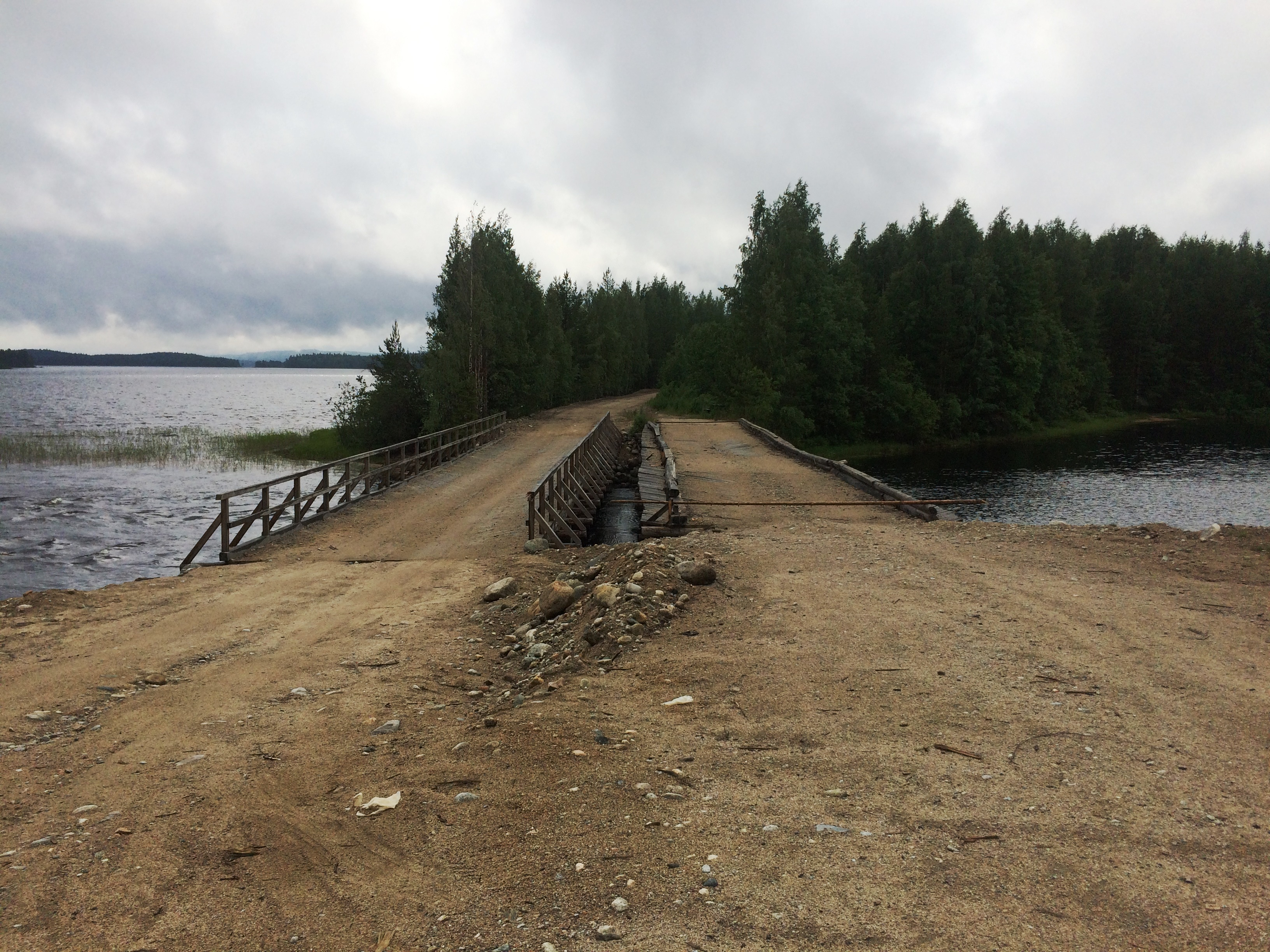 р. Сонго